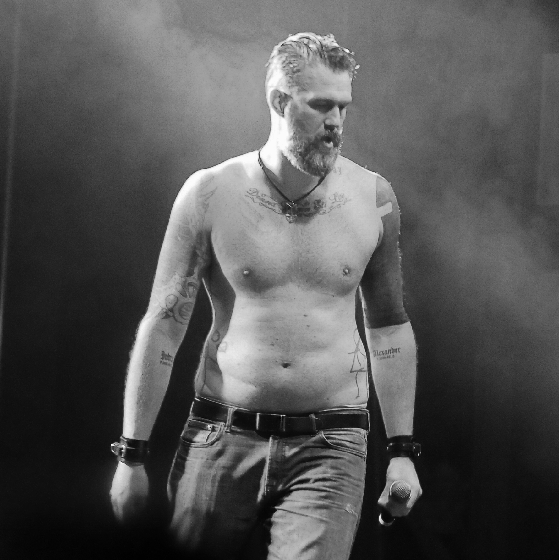 Pouppée Fabrikk auf dem E-Tropolis-Festival 2014 Festivalsommer This photo was created with the support of donations to Wikimedia Deutschland in the context of the CPB project "Festival Summer". This file is made available under the Creative Commons CC0 1.0 Universal Public Domain Dedication. The person who associated a work with this deed has dedicated the work to the public domain by waiving all of their rights to the work worldwide under copyright law, including all related and neighboring rights, to the extent allowed by law. You can copy, modify, distribute and perform the work, even for commercial purposes, all without asking permission. Thomas Springer Personality rights warningAlthough this work is freely licensed or in the public domain, the person(s) shown may have rights that legally restrict certain re-uses unless those depicted consent to such uses. In these cases, a model release or other evidence of consent could protect you from infringement claims.